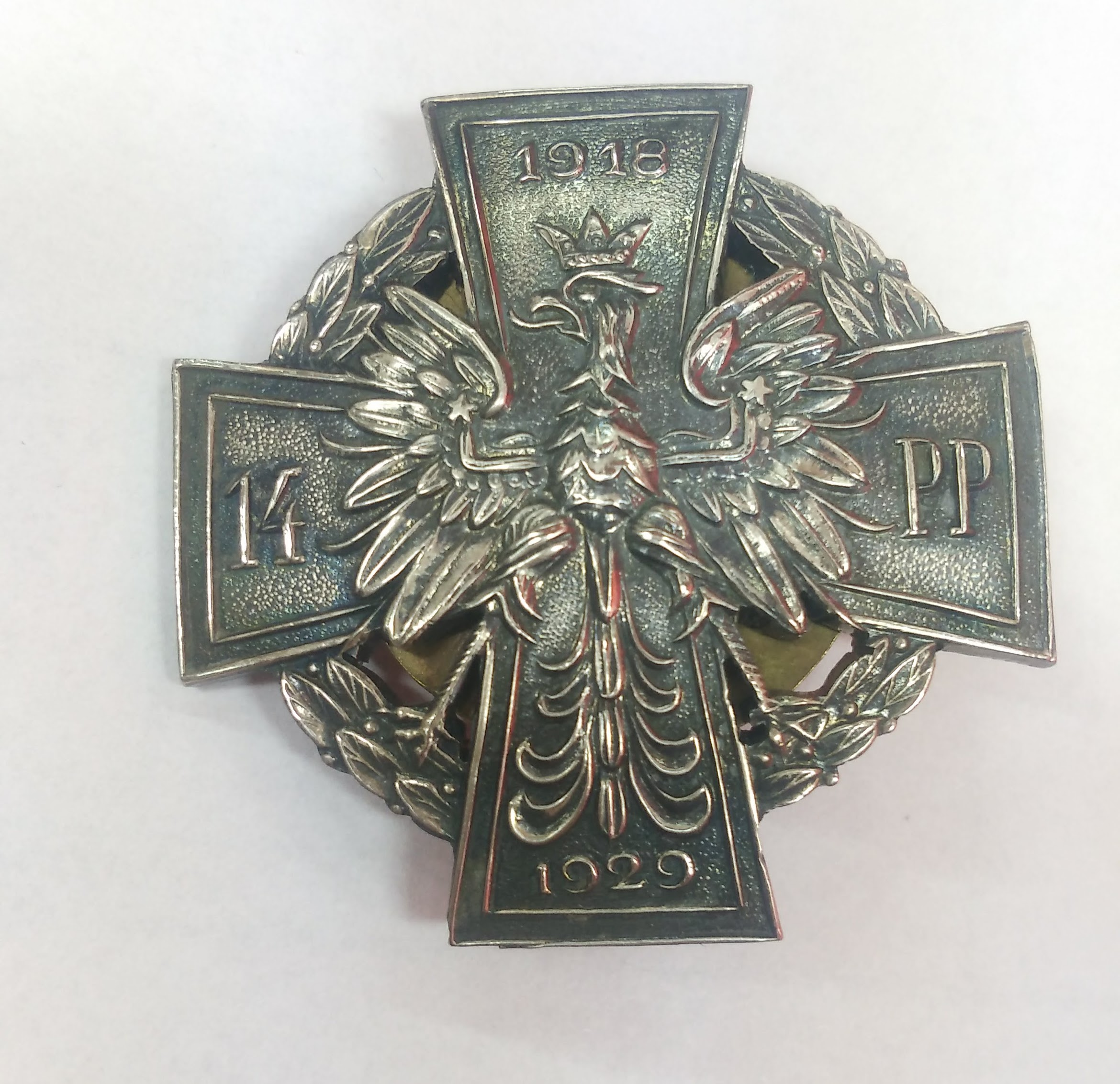 Odznaka pamiątkowa 14 pp